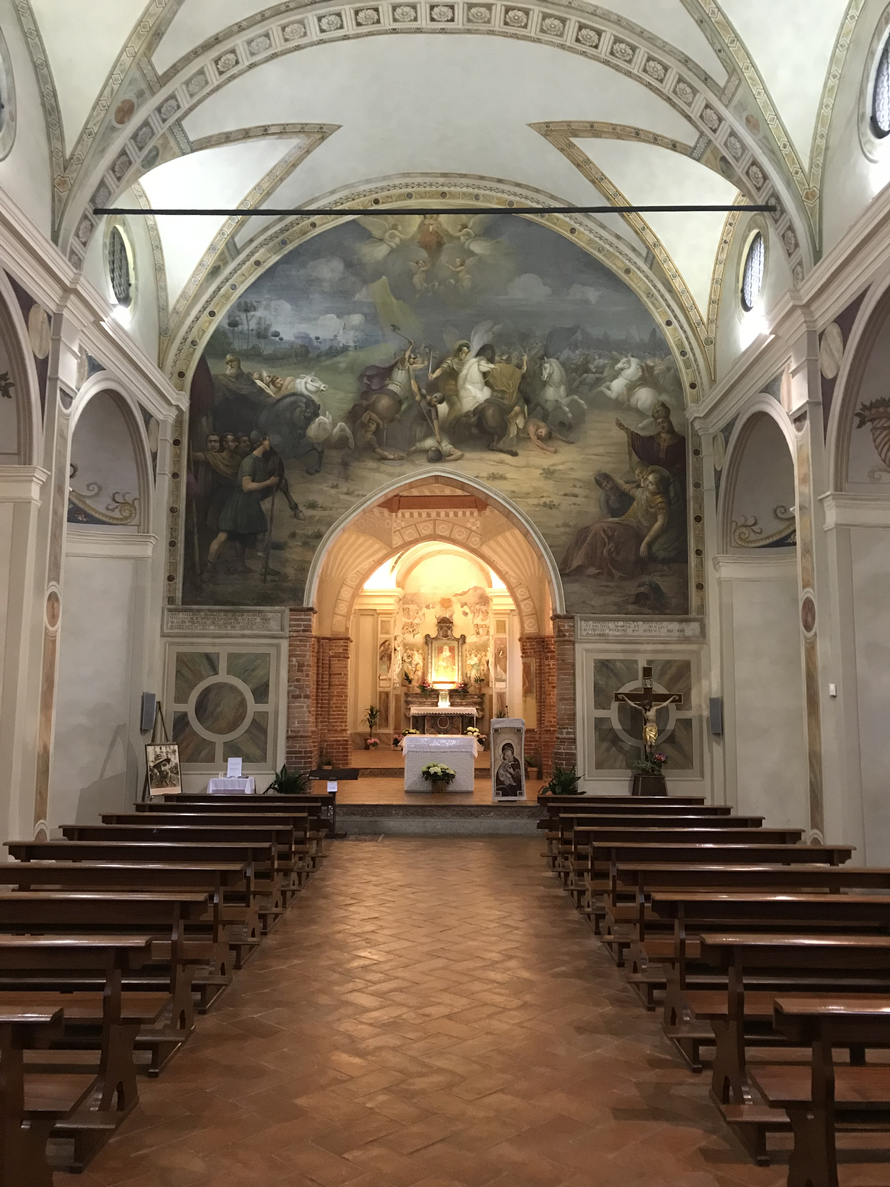 Madonna del Campo, frazione di Mortara: Santuario di Santa Maria del Campo, interno.